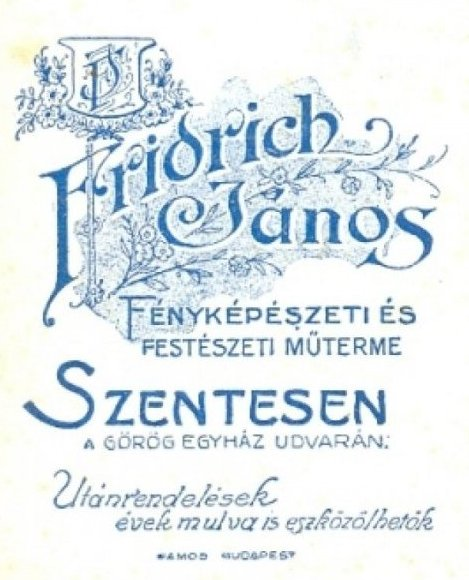 Fridrich János fényképészeti és festészeti műterme Szentesen